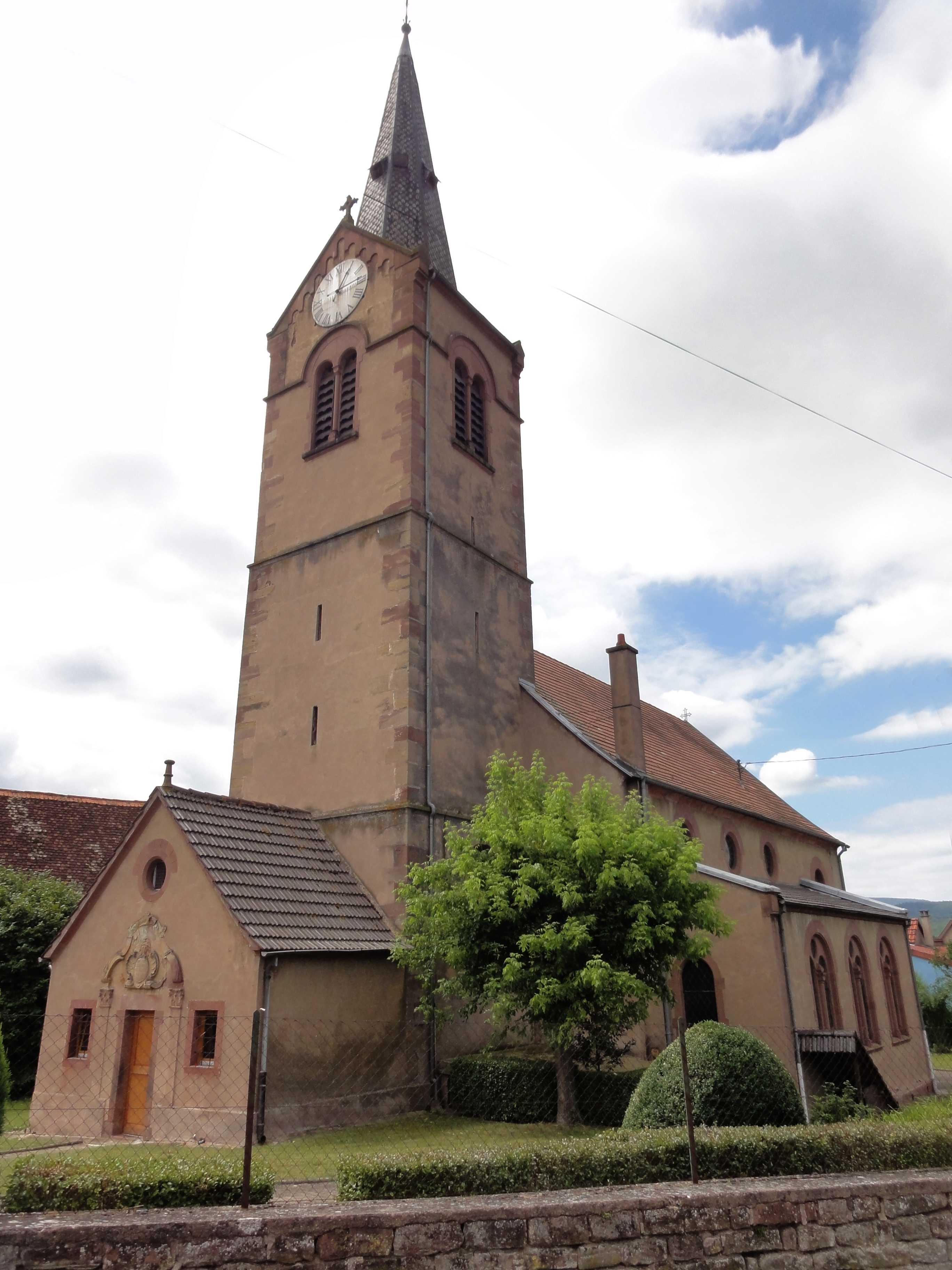 Alsace, Bas-Rhin, Romanswiller, Église protestante (XVIIe-XVIIIe-XIXe), rue des Eglises.